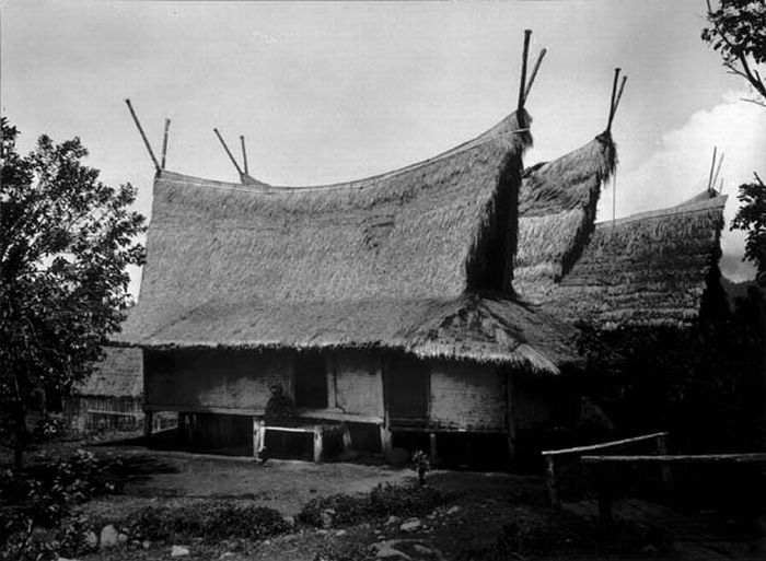 Foto. Kampong Wanaradja bij de vulkaan Papandajan op West-Java.